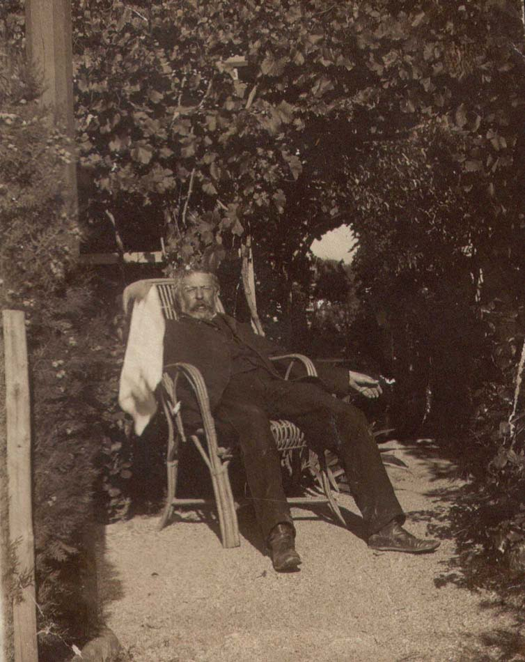 Спиридон Спиридонович Коссич в своем имении под Феодосией (дача Коссича). Фото до 1914 г.